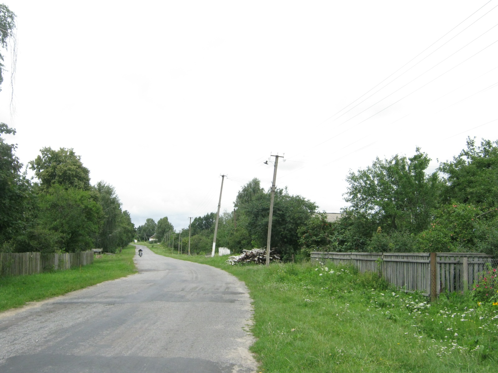 Нова Рудня: Вулиця Нової рудні